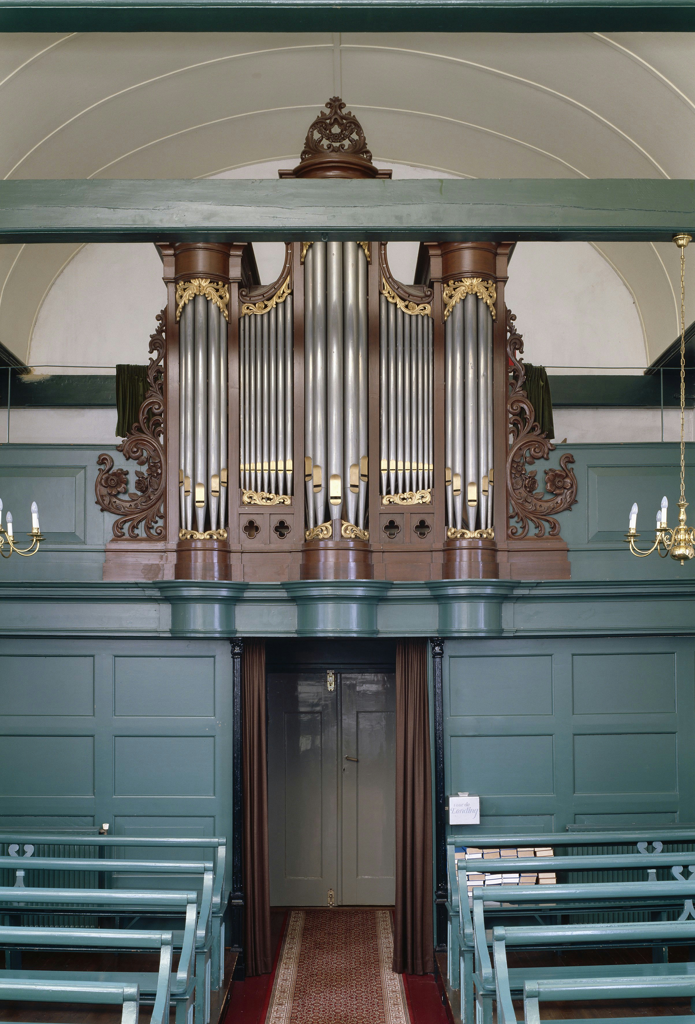 Nederlands Hervormde Kerk: Intenieur, aanzicht orgel (opmerking: Gefotografeerd voor Het Historische Orgel in Nederland 1872-1878, bladzijde 139)